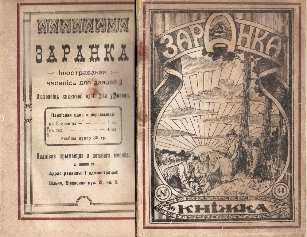 Вокладка беларускага чаcопіса "Заранка", № 8-9. Рэдактар Зоська Верас. Выходзіў у 1927—1931 гг. в Вільне